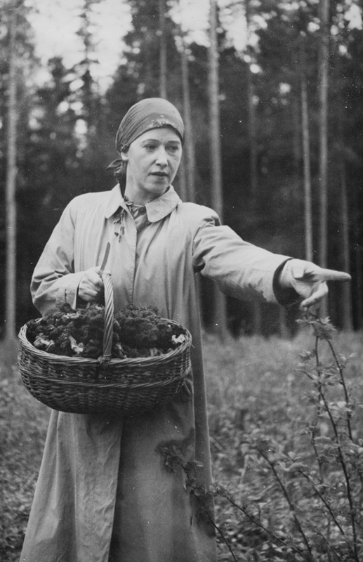 Ooniste otsimisel Erastvere metsas